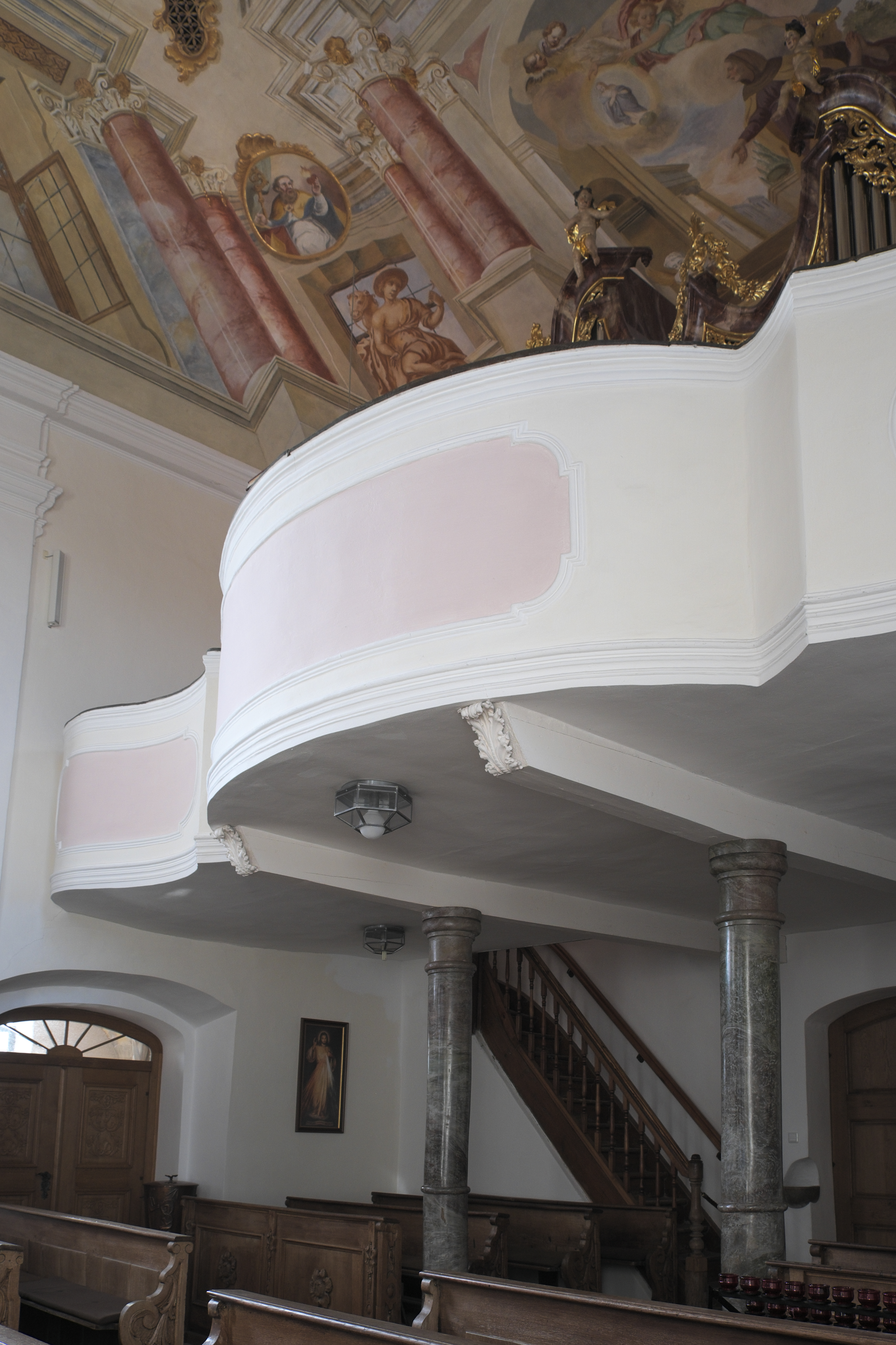 Katholische Pfarrkirche Mariä Heimsuchung in Gosseltshausen (Wolnzach) im Landkreis Pfaffenhofen an der Ilm (Bayern/Deutschland), Empore